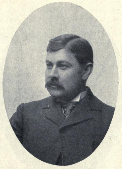 Albert Kenrick Fisher (21 March 1856 – 12 June 1948)